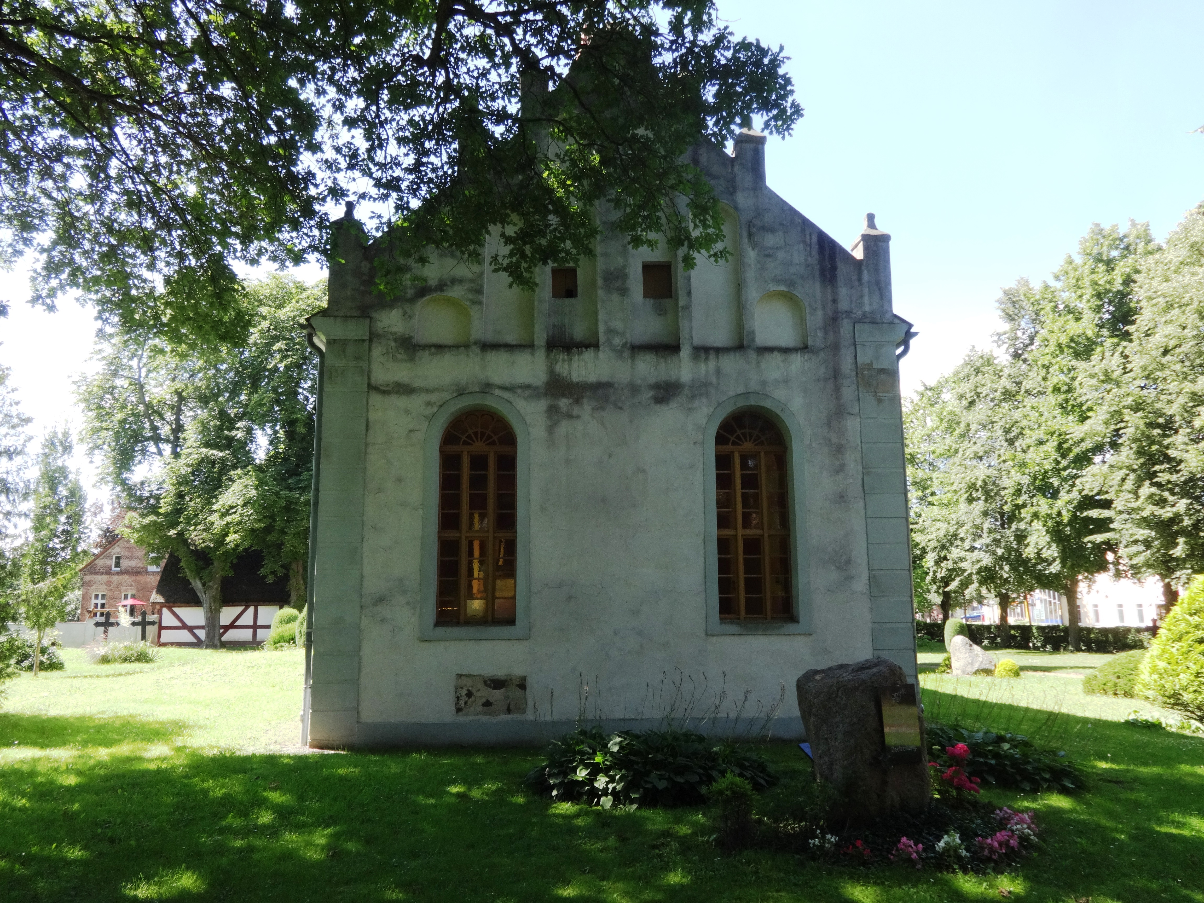 Die Kirche in Ducherow ist eine vermutlich aus dem 15. Jahrhundert stammende Feldsteinkirche. Im Innern befindet sich unter anderem ein qualitätsvoller Kanzelaltar aus dem 17. Jahrhundert.